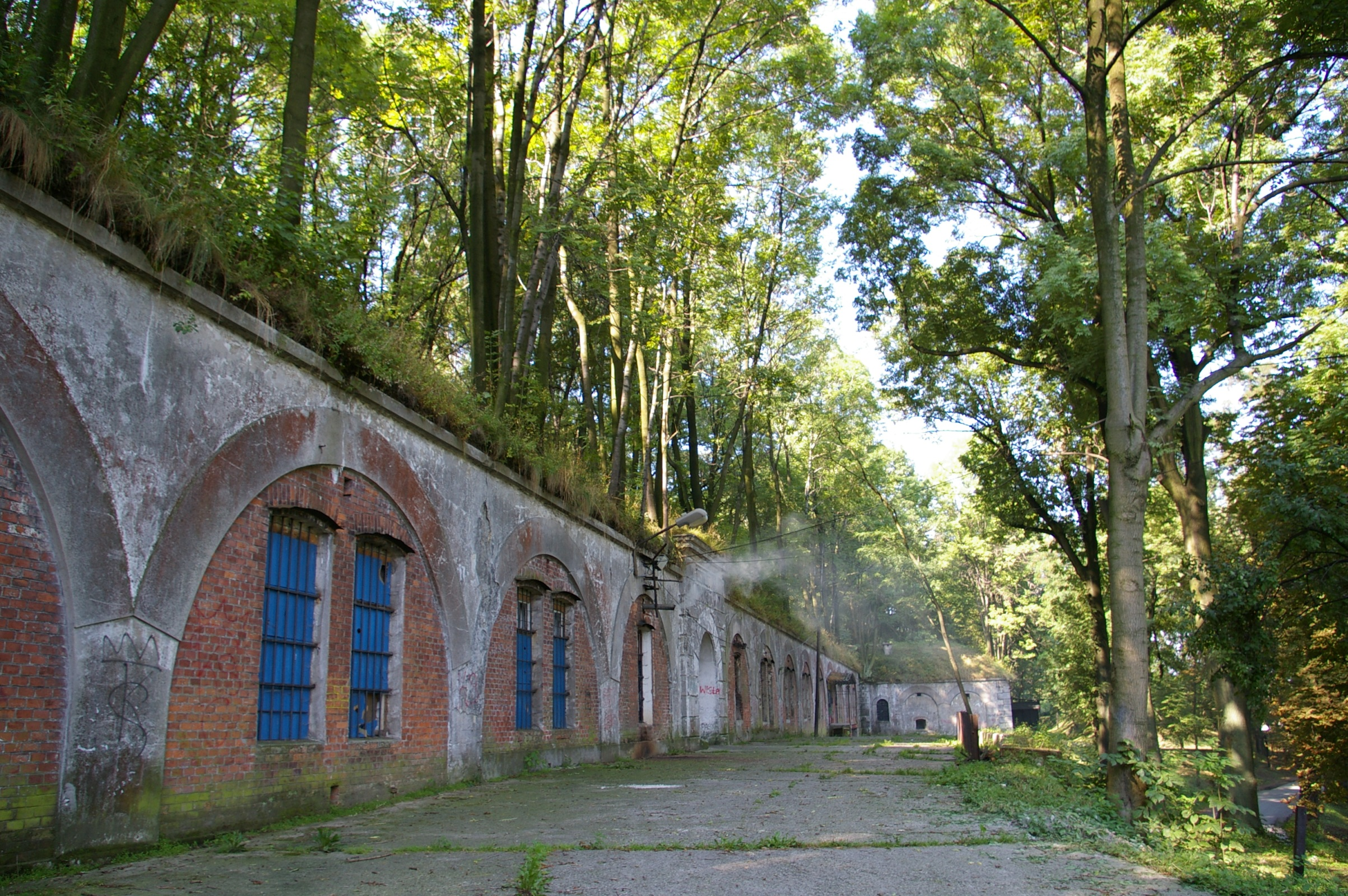 Fort 51 Rajsko, Kraków